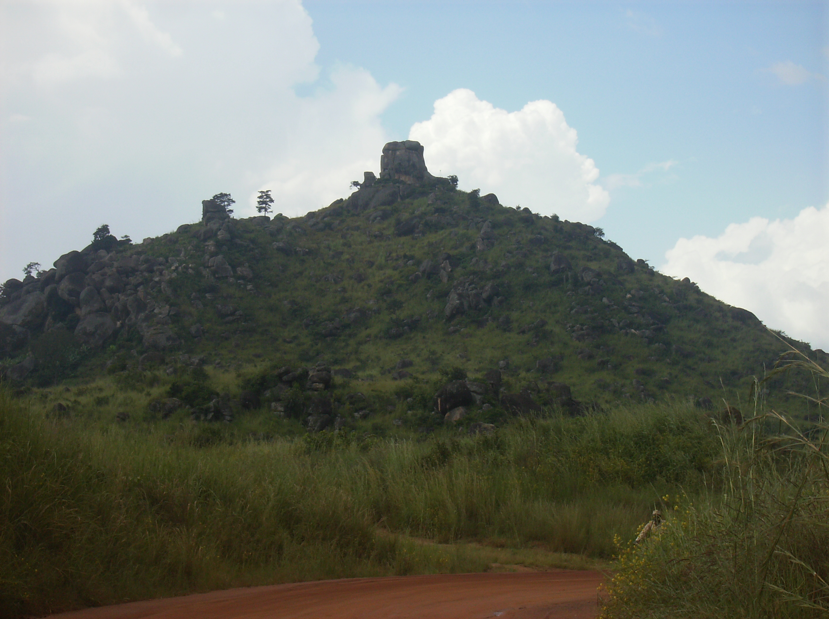 Mont Ngaoundéré (Mont au nombril)